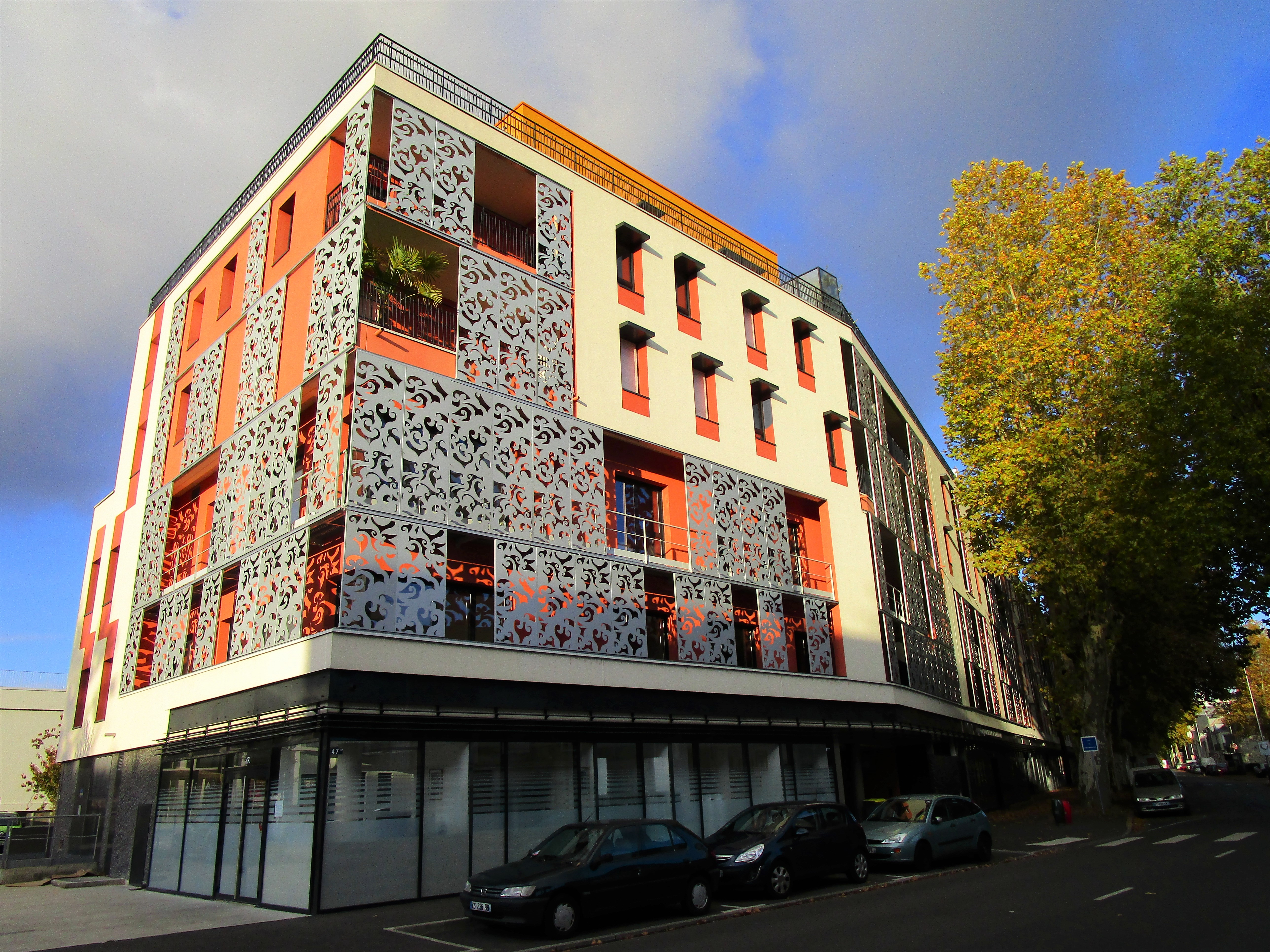 Immeuble sur le boulevard Preuilly dans le quartier Lamartine de Tours.